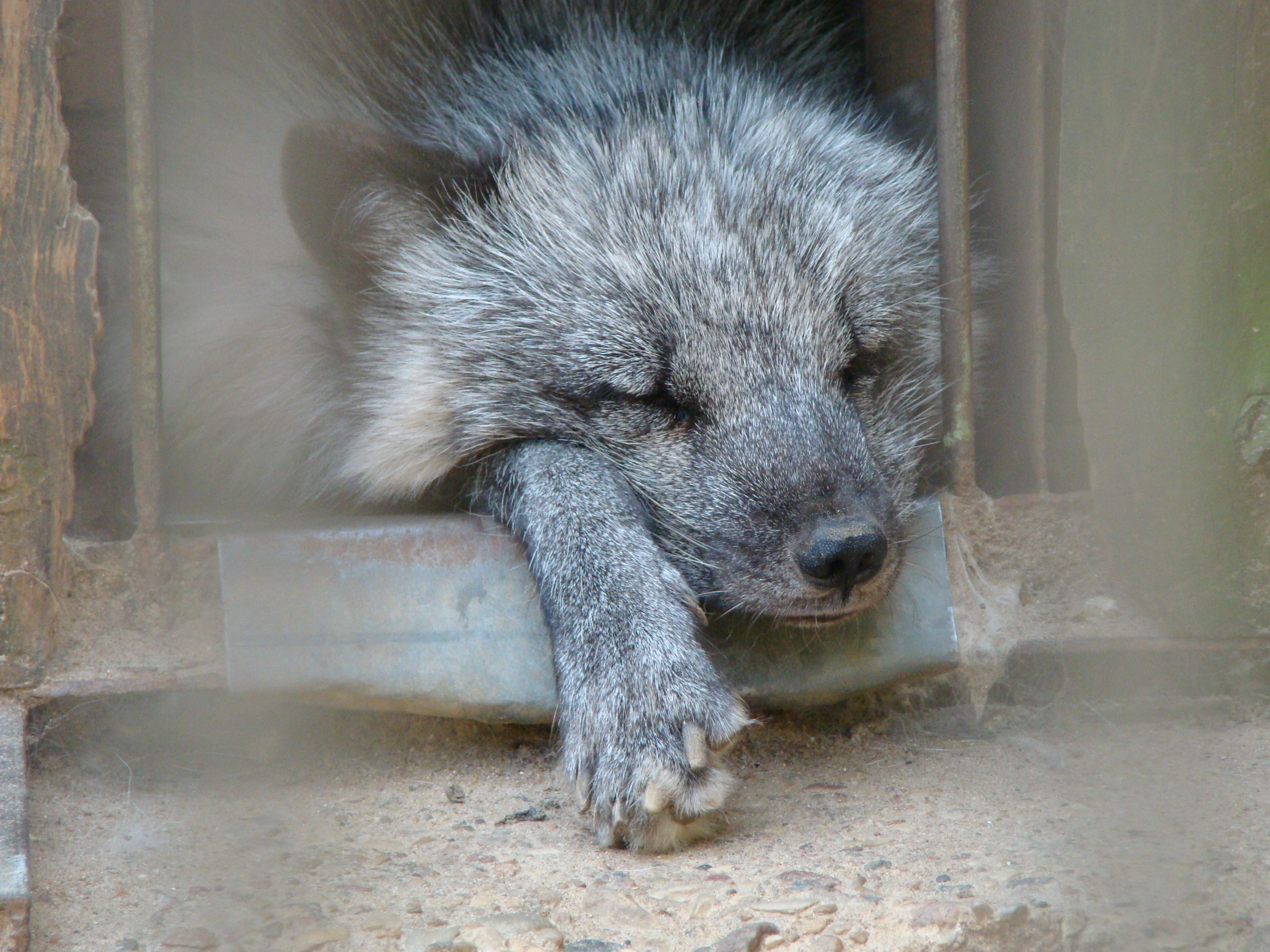 Poliarinė lapė Kauno zoologijos sode